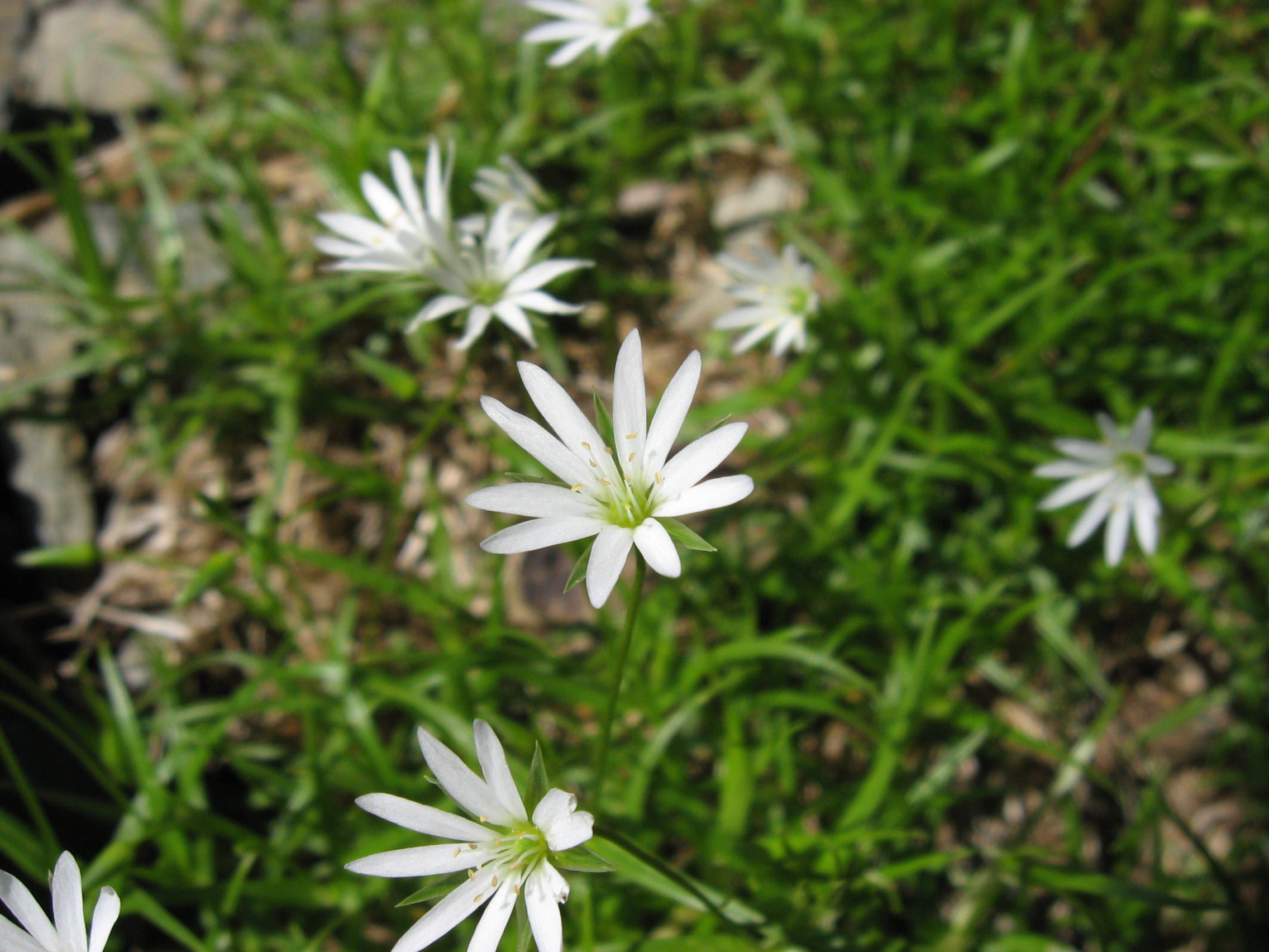 Stellaria nipponica イワツメクサ